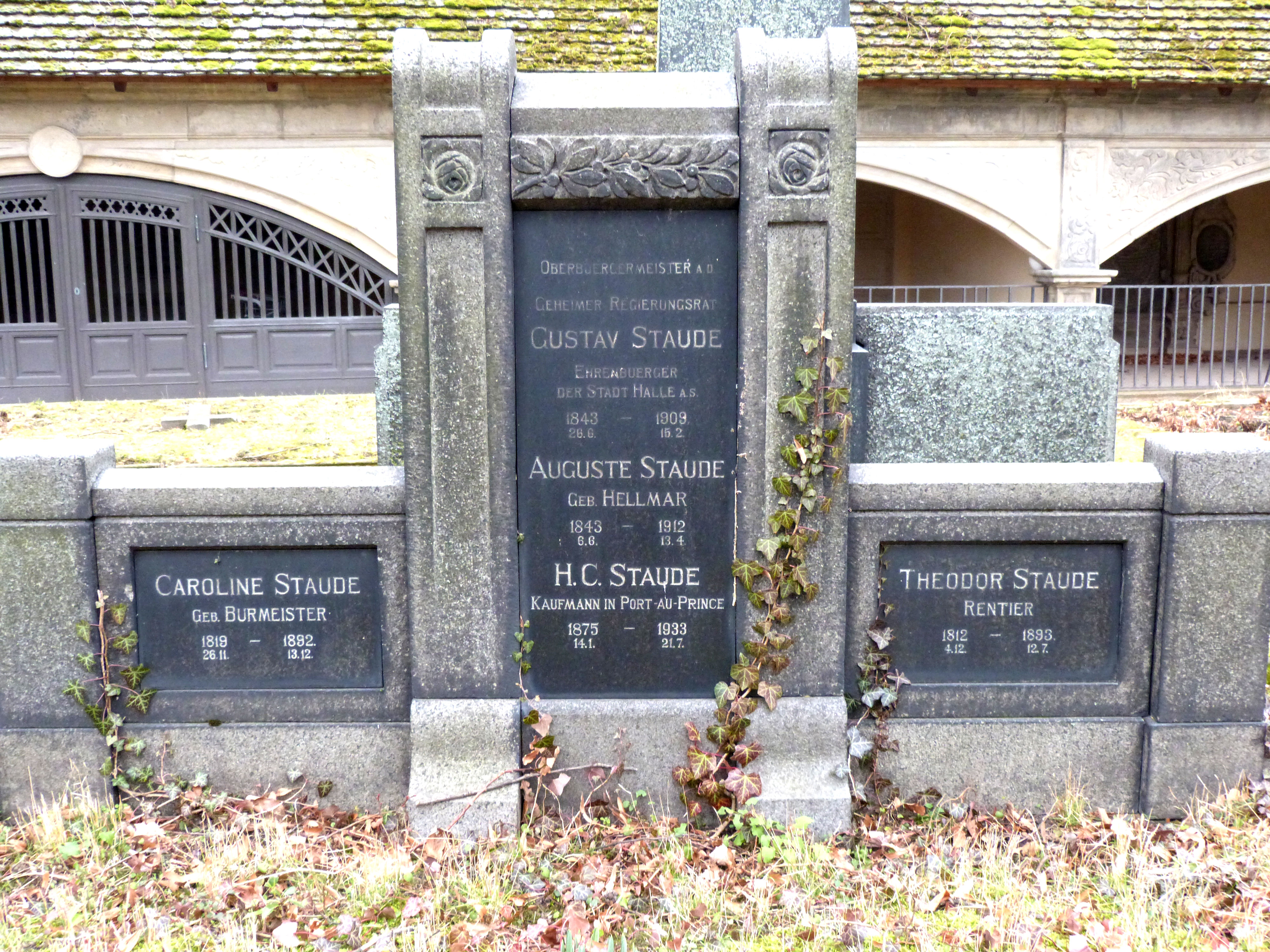 Grab von Gustav Staude, Stadtgottesacker Halle, Innenfeld Abt. III